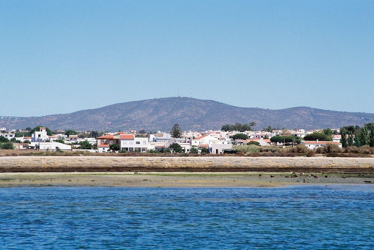 Monte de S. Miguel visto da Ria Formosa - Olhão